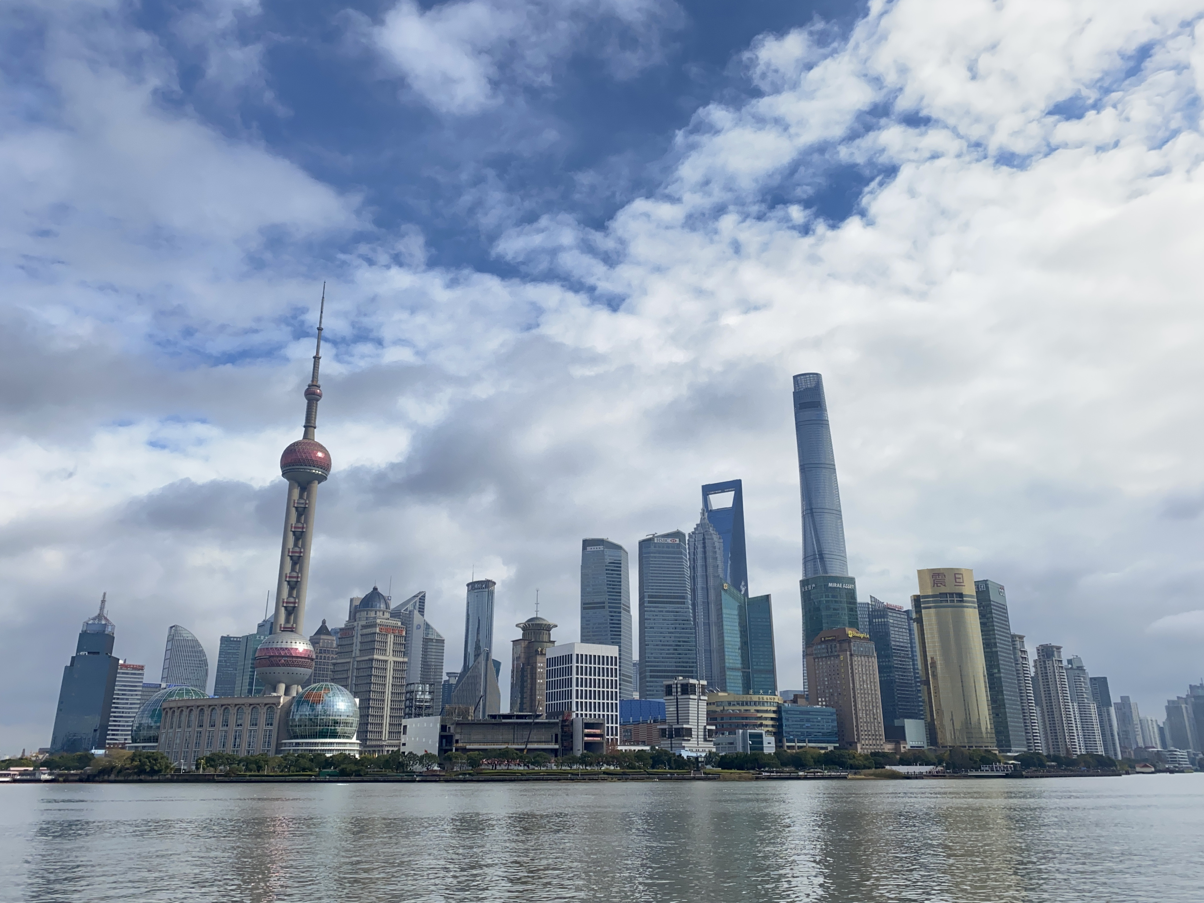 从外滩望向陆家嘴，2019年